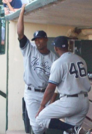 Juan Miranda 2009 02:24, 30 July 2009 . . Phil5329 . . 315×461 (19 KB)